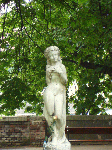 Praga, park na Kampie, Dziewczyna z winogronem - Karla Vobišová-Žáková